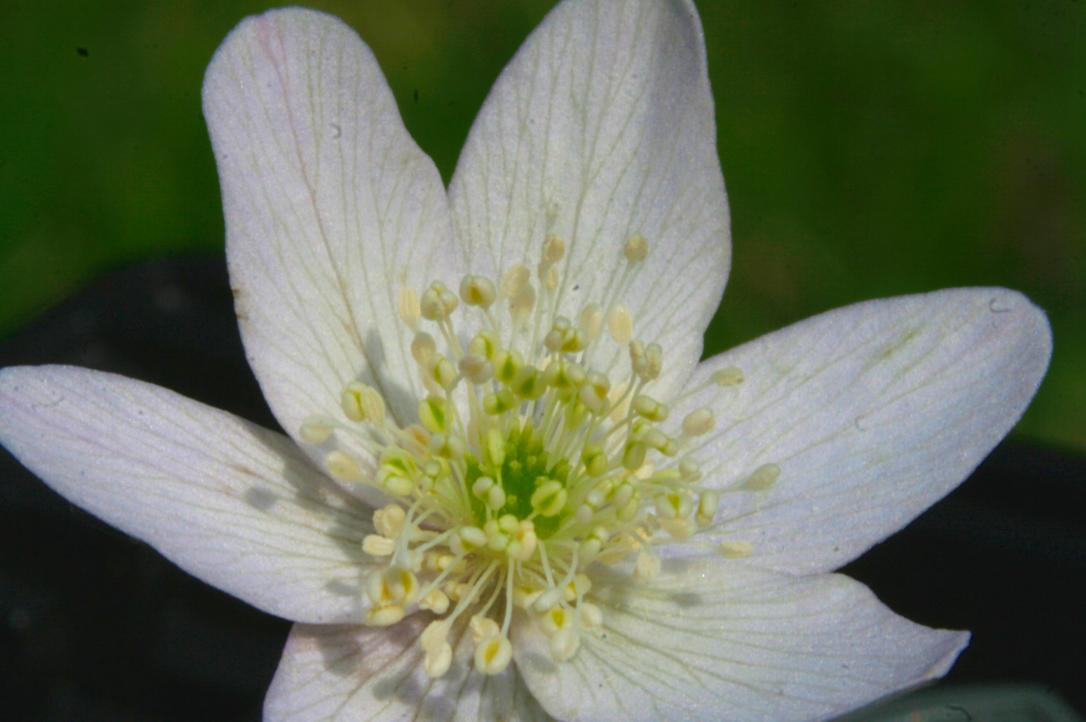 Anemone trifolia - Il fiore. Località: Val Piana, Limana (BL), 850 m s.l.m.